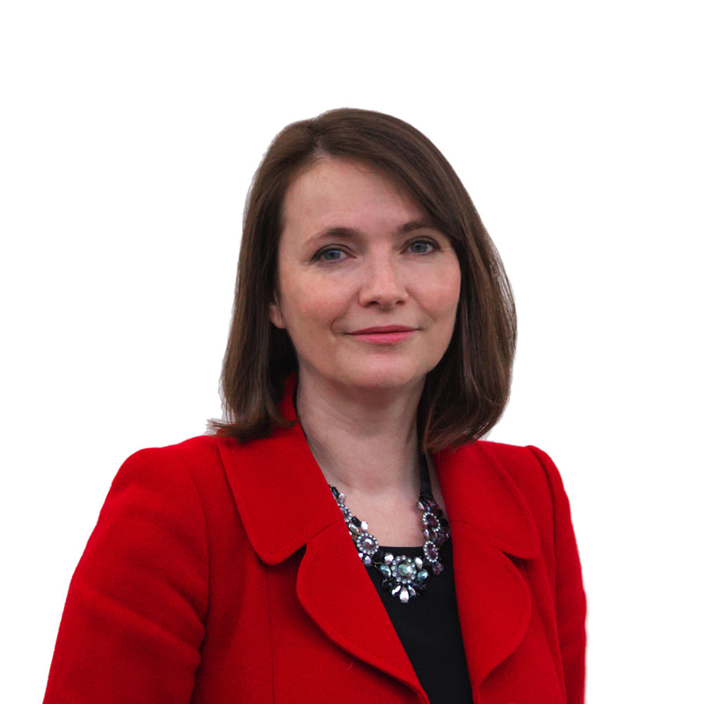 Plaid: Democratiaid Rhyddfrydol Cymru Etholaeth: Brycheiniog a Sir Faesyfed Party: Welsh Liberal Democrats Constituency: Brecon and Radnorshire